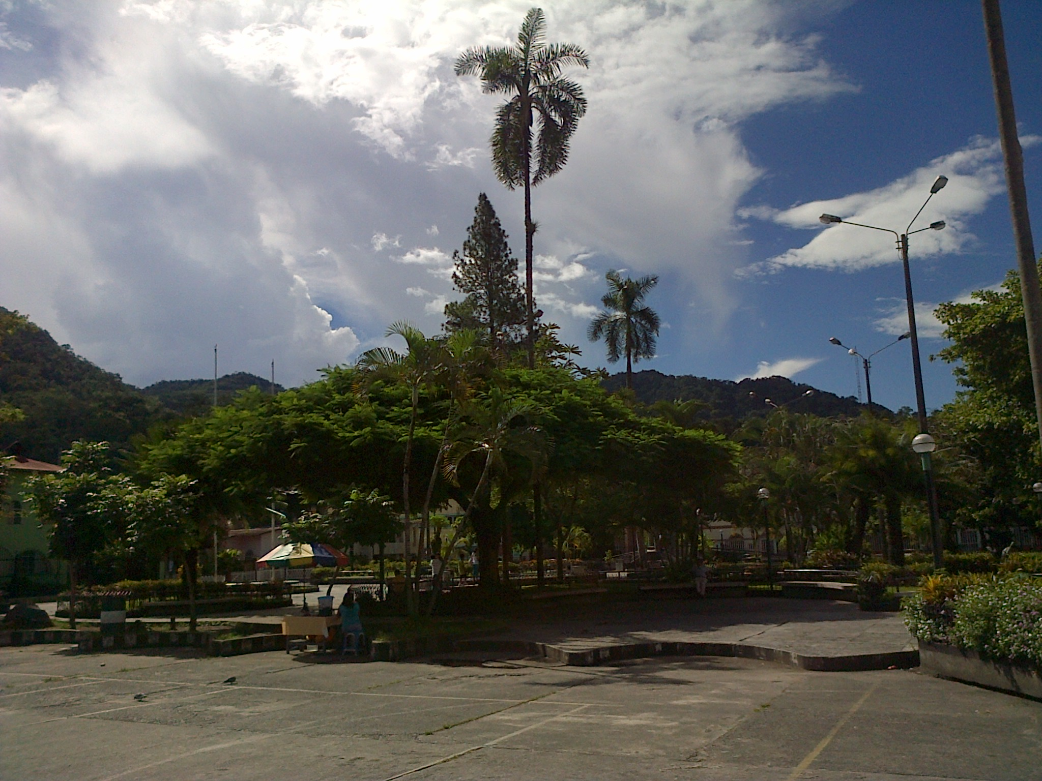 Plaza de Armas de San Ramón